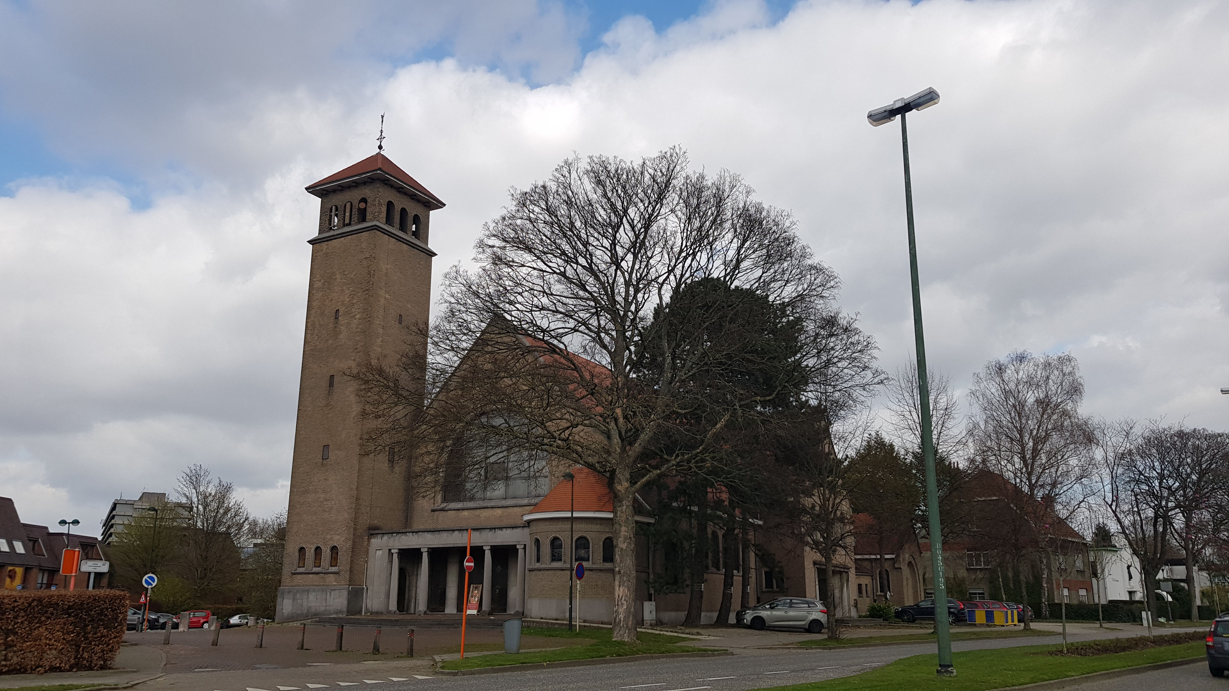 Église Notre-Dame de l'Assomption, Woluwe-Saint-Lambert, Belgique